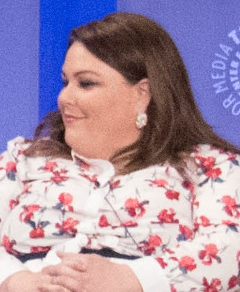 Actress Chrissy Metz at the 2017 paleyfest to promote This is us